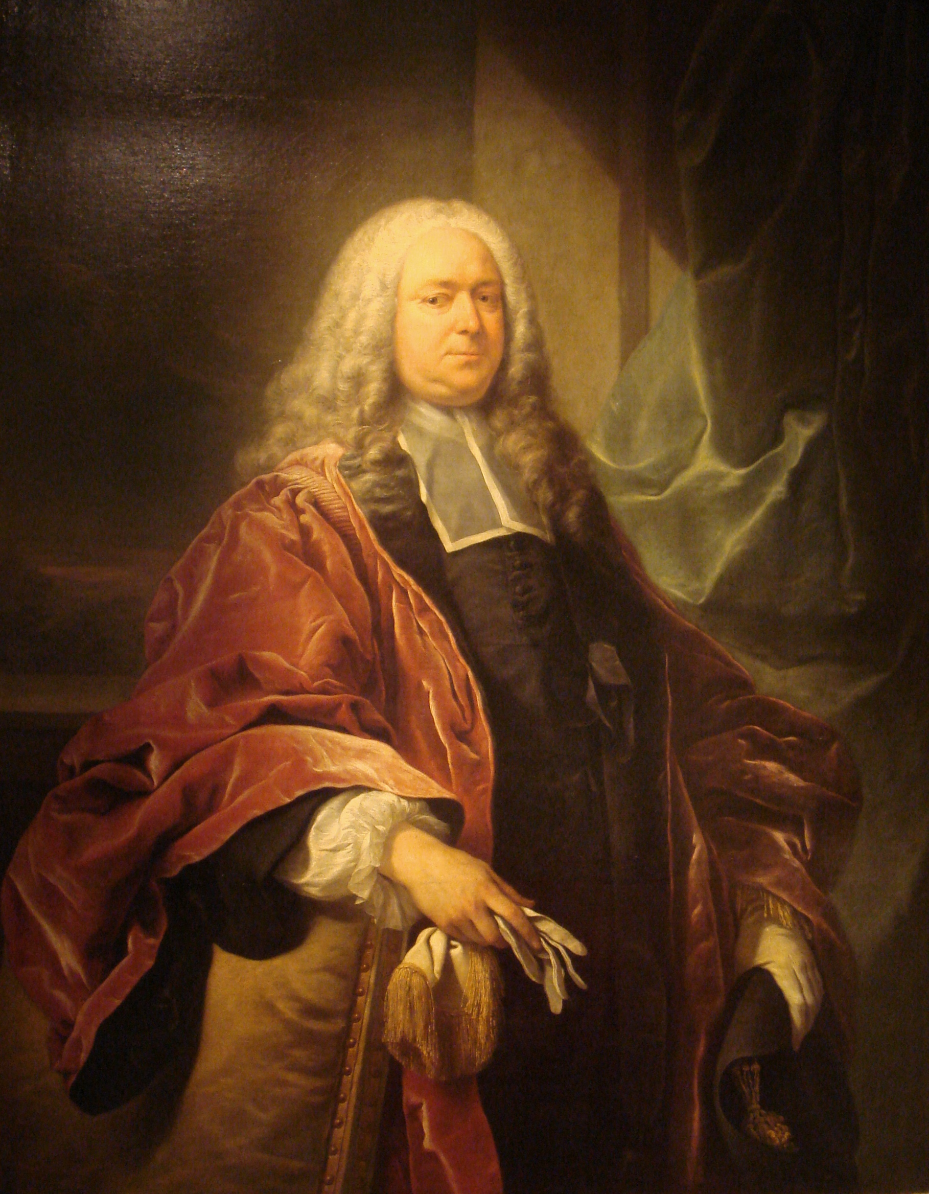 Portrait of Michel-Étienne Turgot (1690–1751)